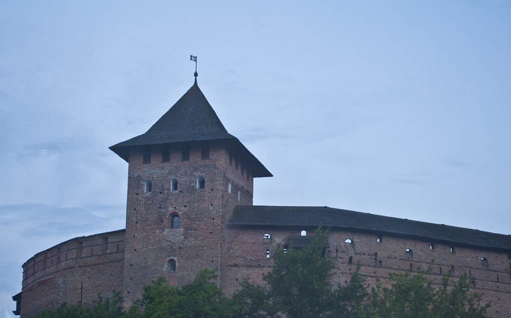 Замок Любарта